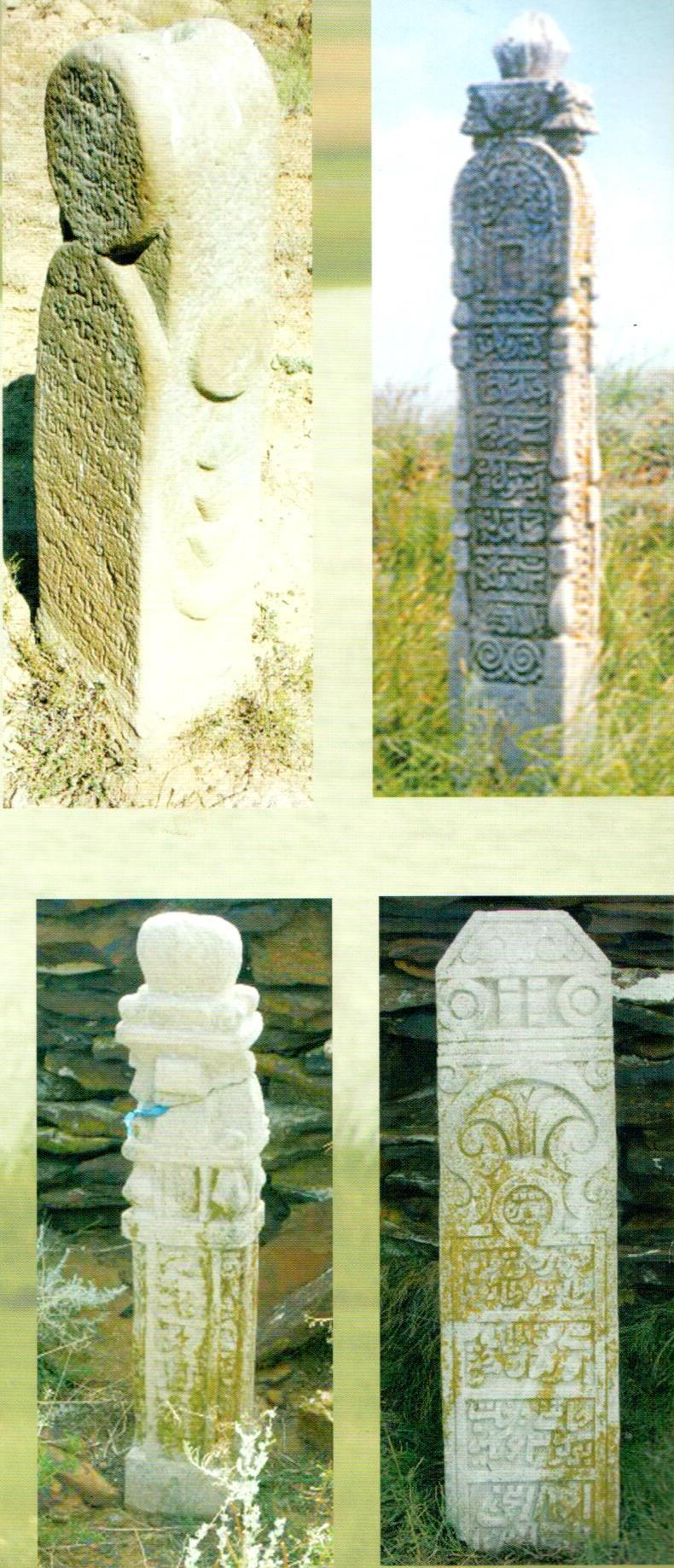 Қазақша (кирил): Мәні қорымы